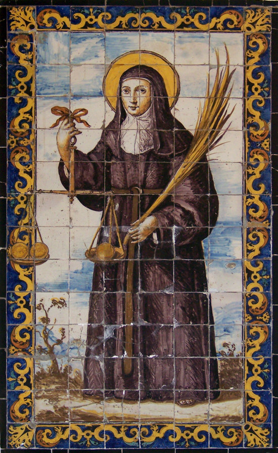 Retablo cerámico con Clara de Montefalco, en el vestíbulo del Museo de Bellas Artes. Plaza del Museo. Sevilla. Procedente de la fachada de la Iglesia del Convento de Nuestra Señora del Pópulo de Agustinos Descalzos. Sevilla.